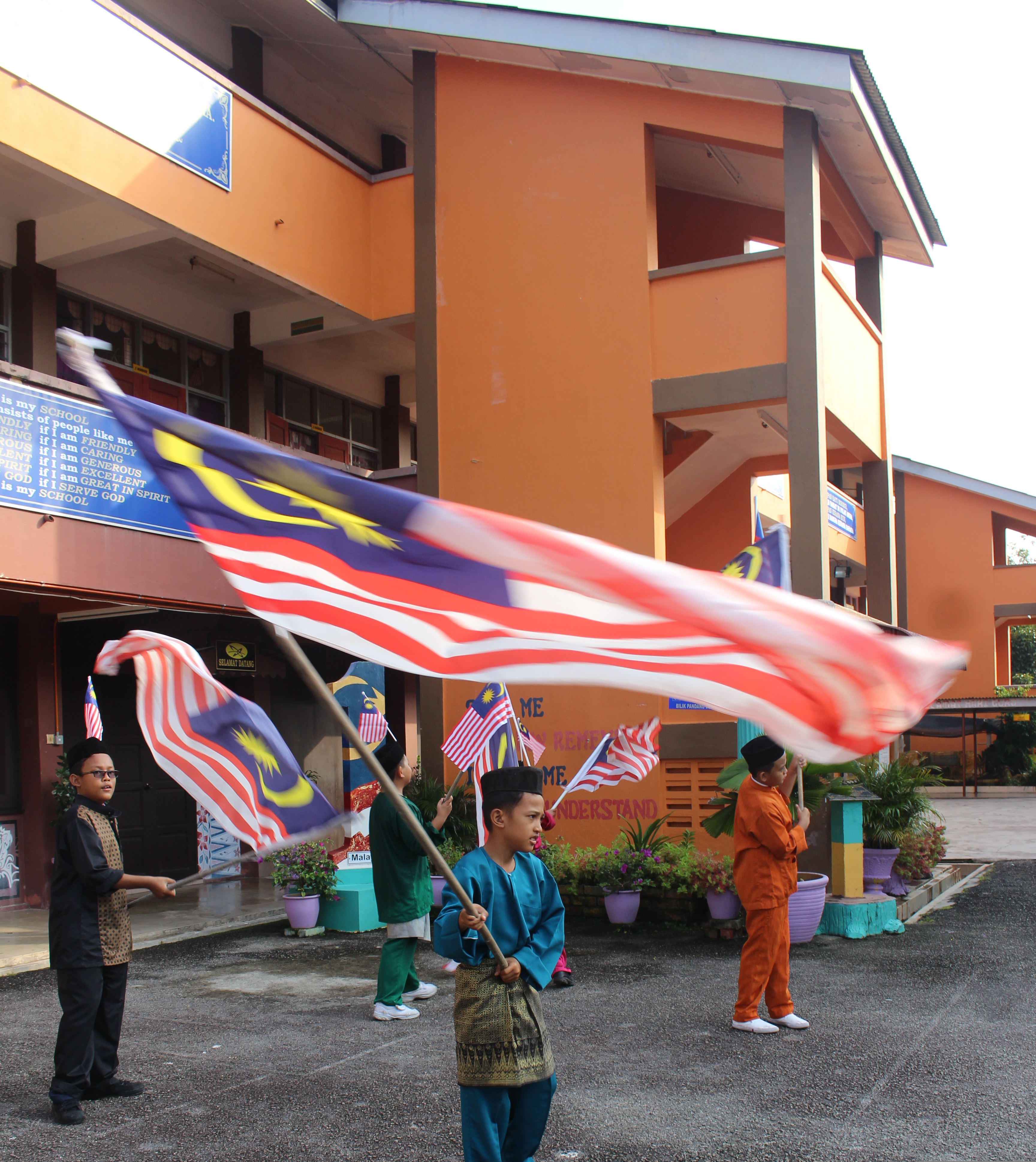 Pembawa Bendera Mengibarkan Jalur Gemilang